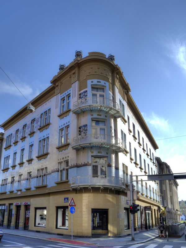 Zagreb